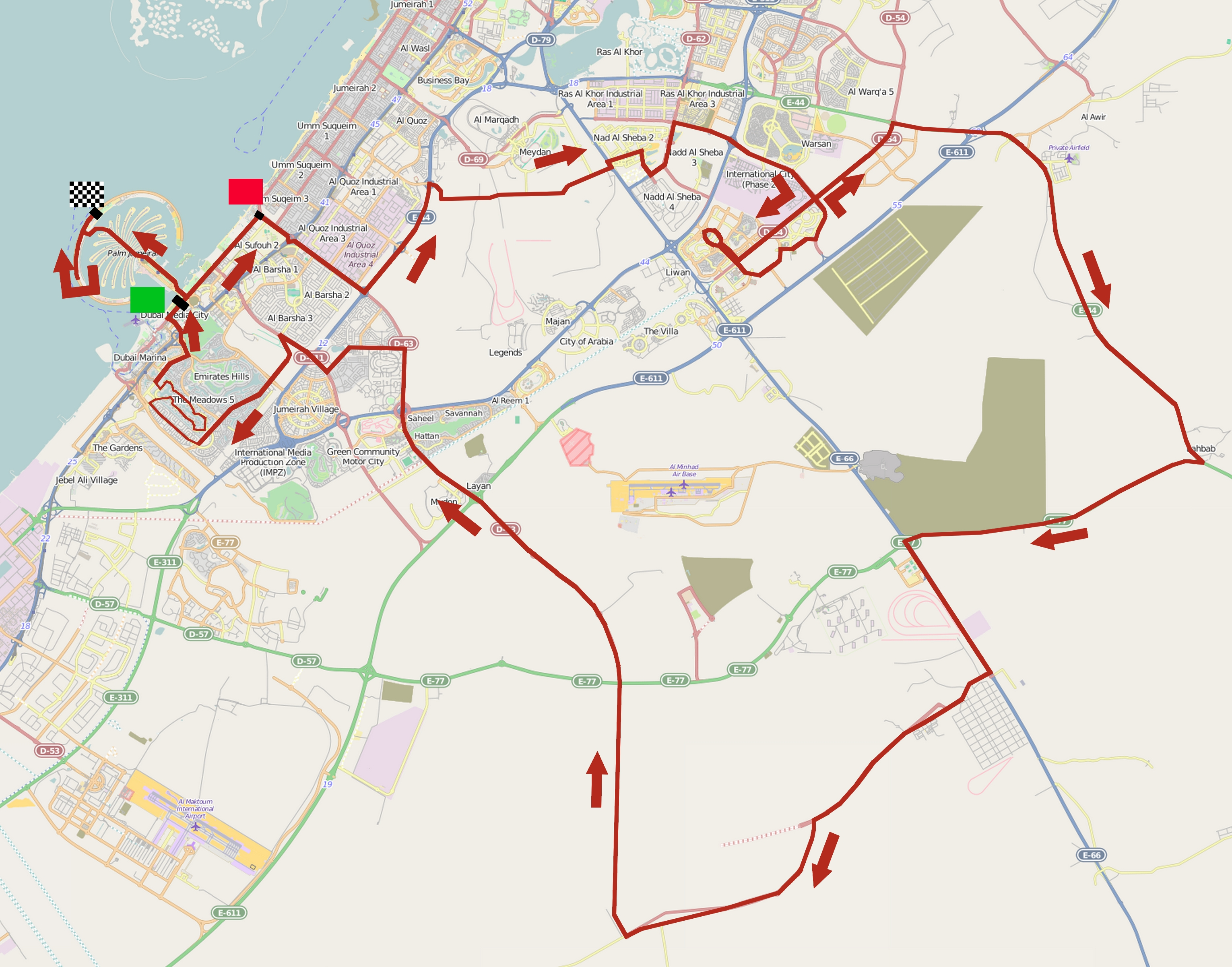 Parcours de la deuxième étape du Dubaï Tour 2015. This map may be incomplete, and may contain errors. Don't rely solely on it for navigation.